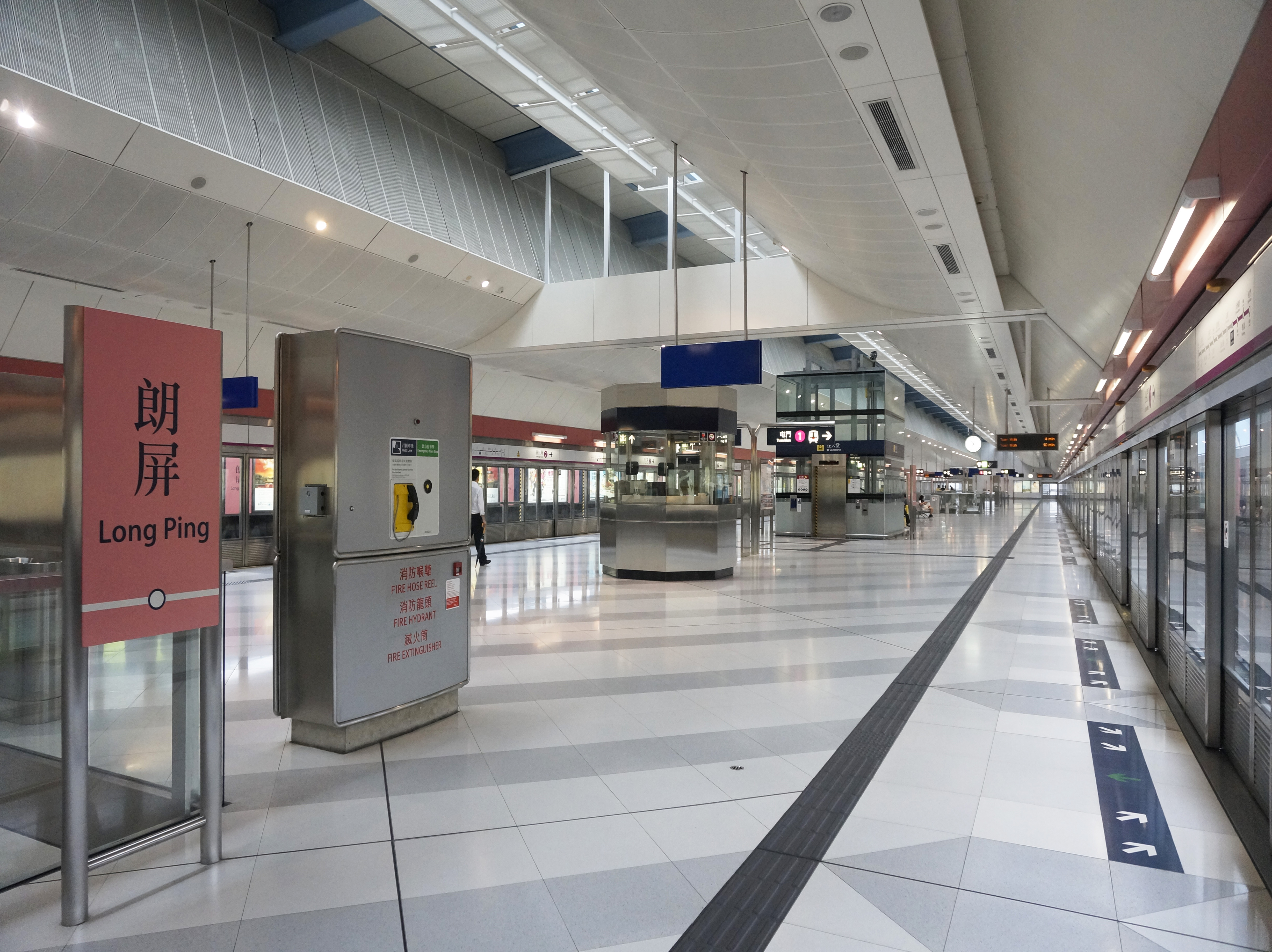 港鐵朗屏站月台